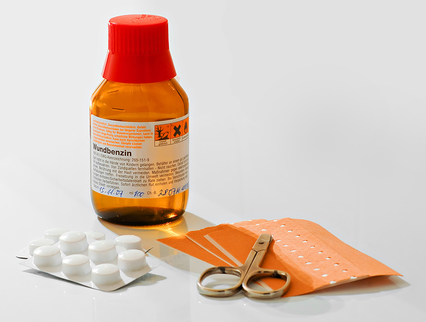 Wundbenzin in einer handelsüblichen kleinen Glasflasche.